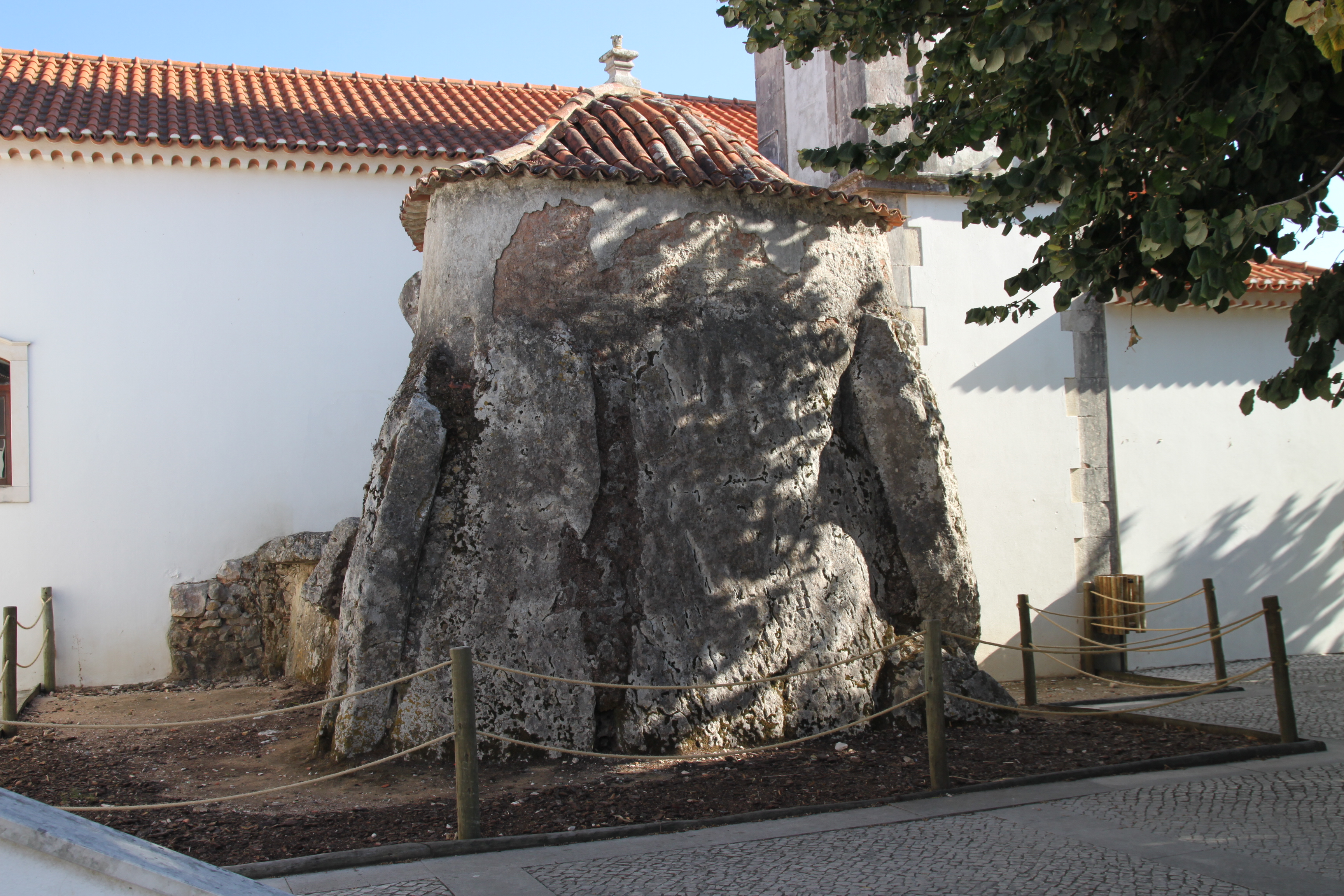 Igreja de Santa Maria Madalena ou Igreja Paroquial de Alcobertas, e megálito-capela adjacente This file was uploaded for Wiki Loves Monuments in Portugal with the unique identifier 72743.